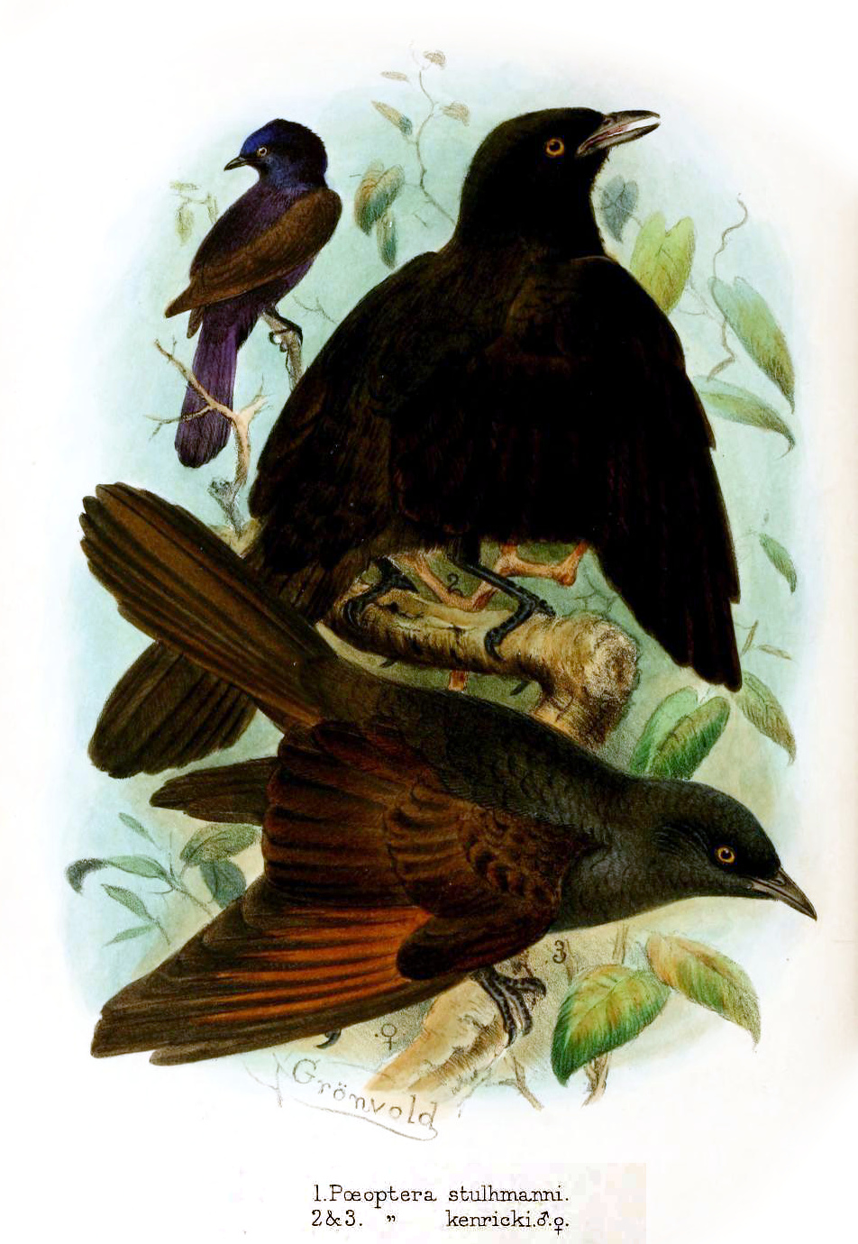 Poeoptera stuhlmanni, P. kenricki